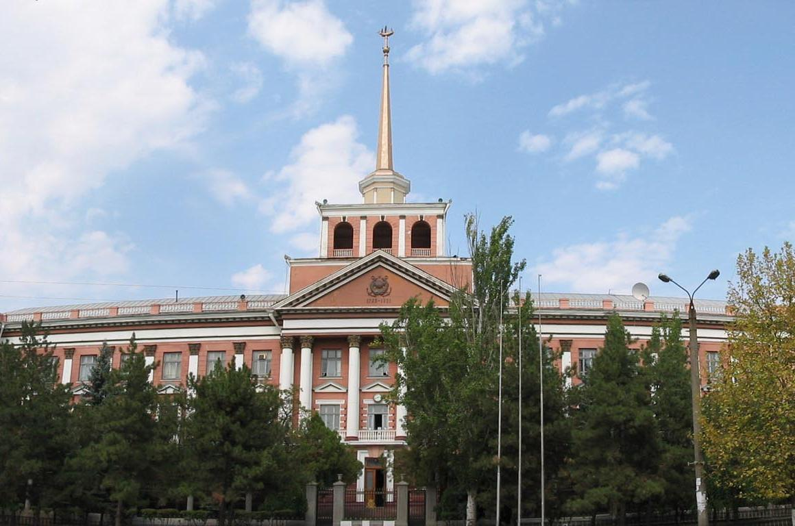 Будинок_Адміралтейства_у_Миколаєві.jpg: Будинок Адміралтейства в місті Миколаєві (серпень 2007)